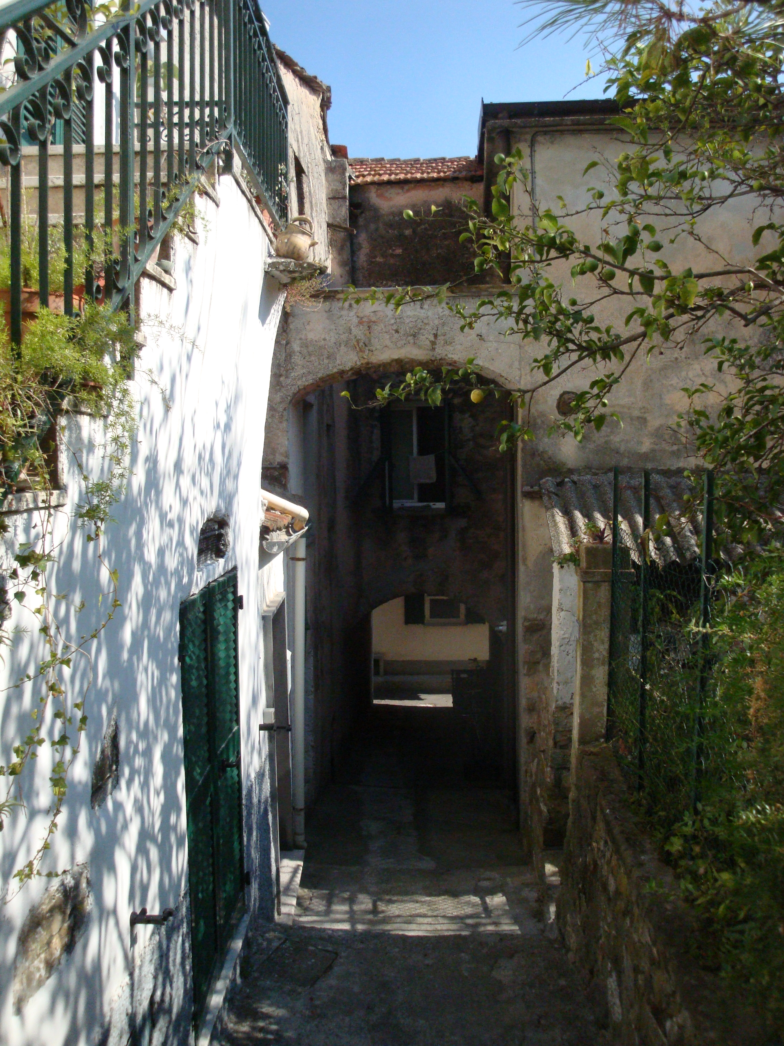 Autore: Tony Frisina - Alessandria